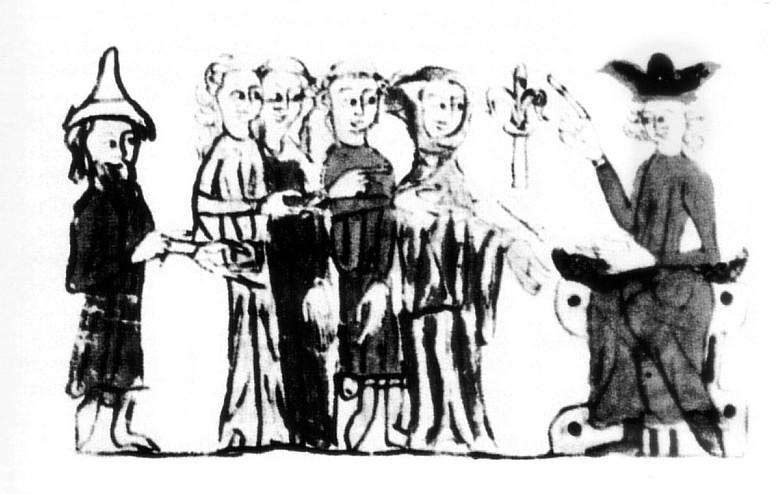 Schutzjude mit spitzem Hut vor dem König